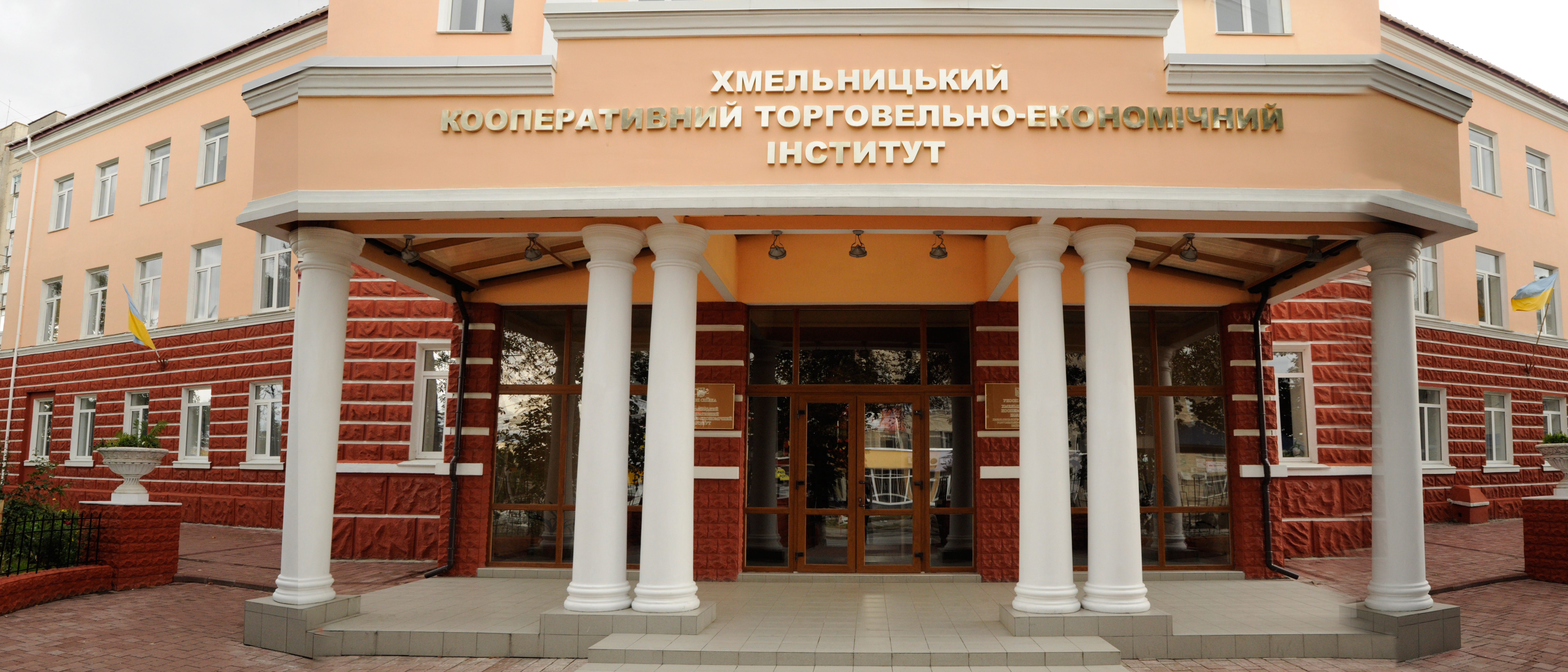 Навчальний корпус ХКТЕІ.